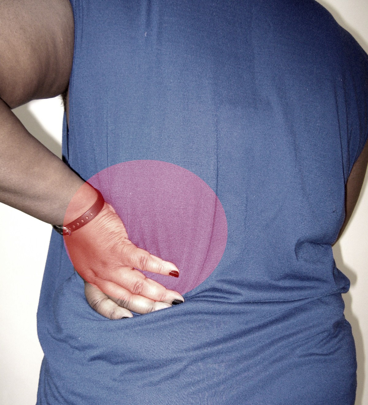 Douleur fosse lombaire gauche - tableau de pyélonéphrite - Pyelonephritis